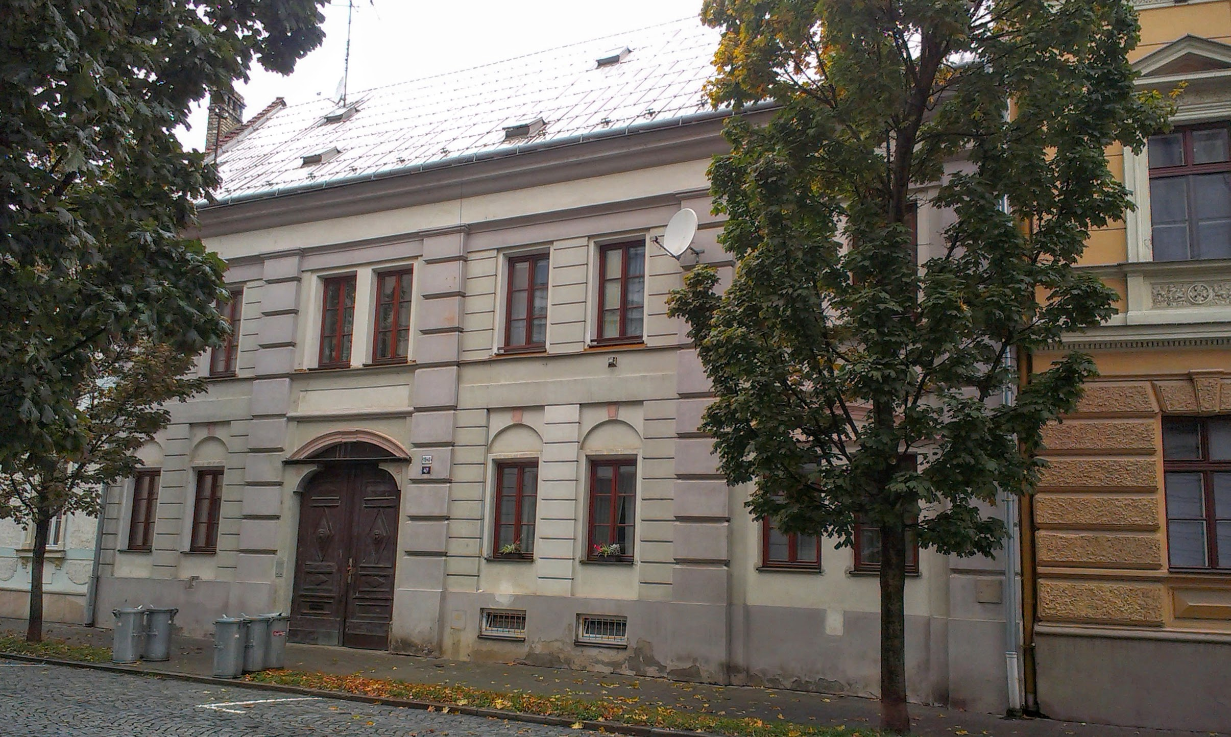 Kroměříž Malý val 1540, rodný dům Miloše Macourka